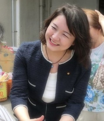 東京都大田区の街頭演説にて